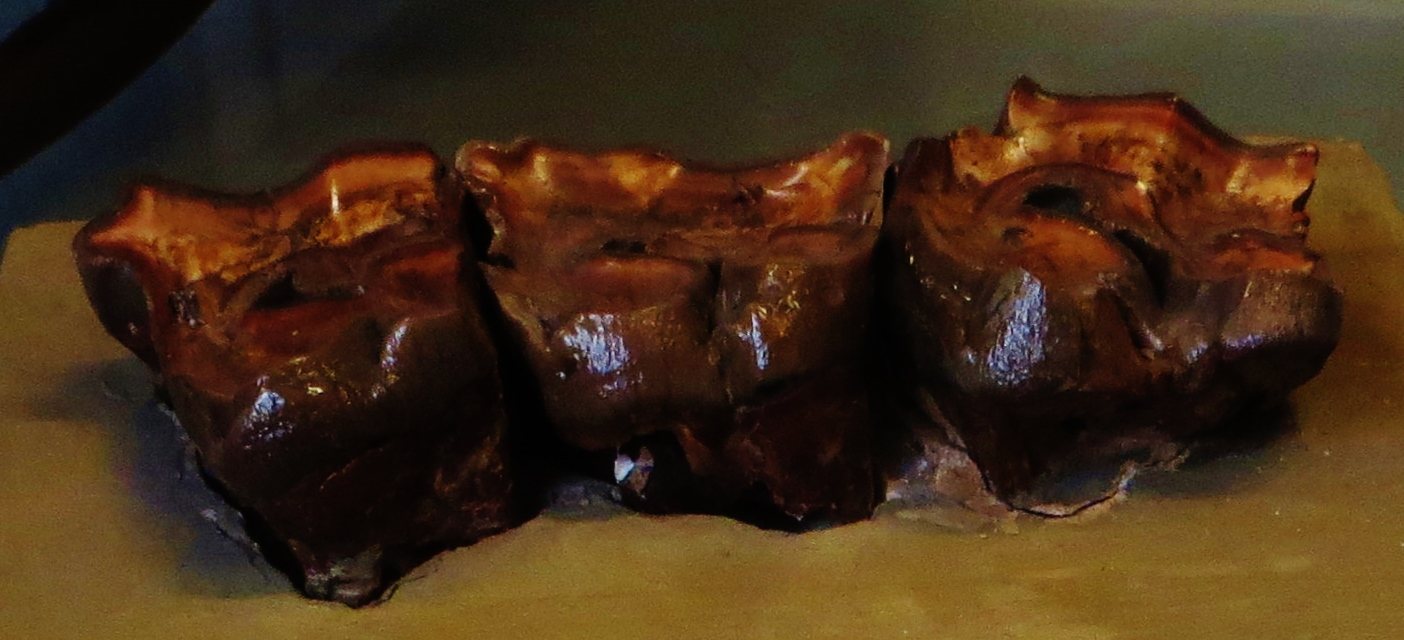 Fossil of Protaceratherium, an extinct mammal - Took the photo at Musee d'Histoire Naturelle, Paris